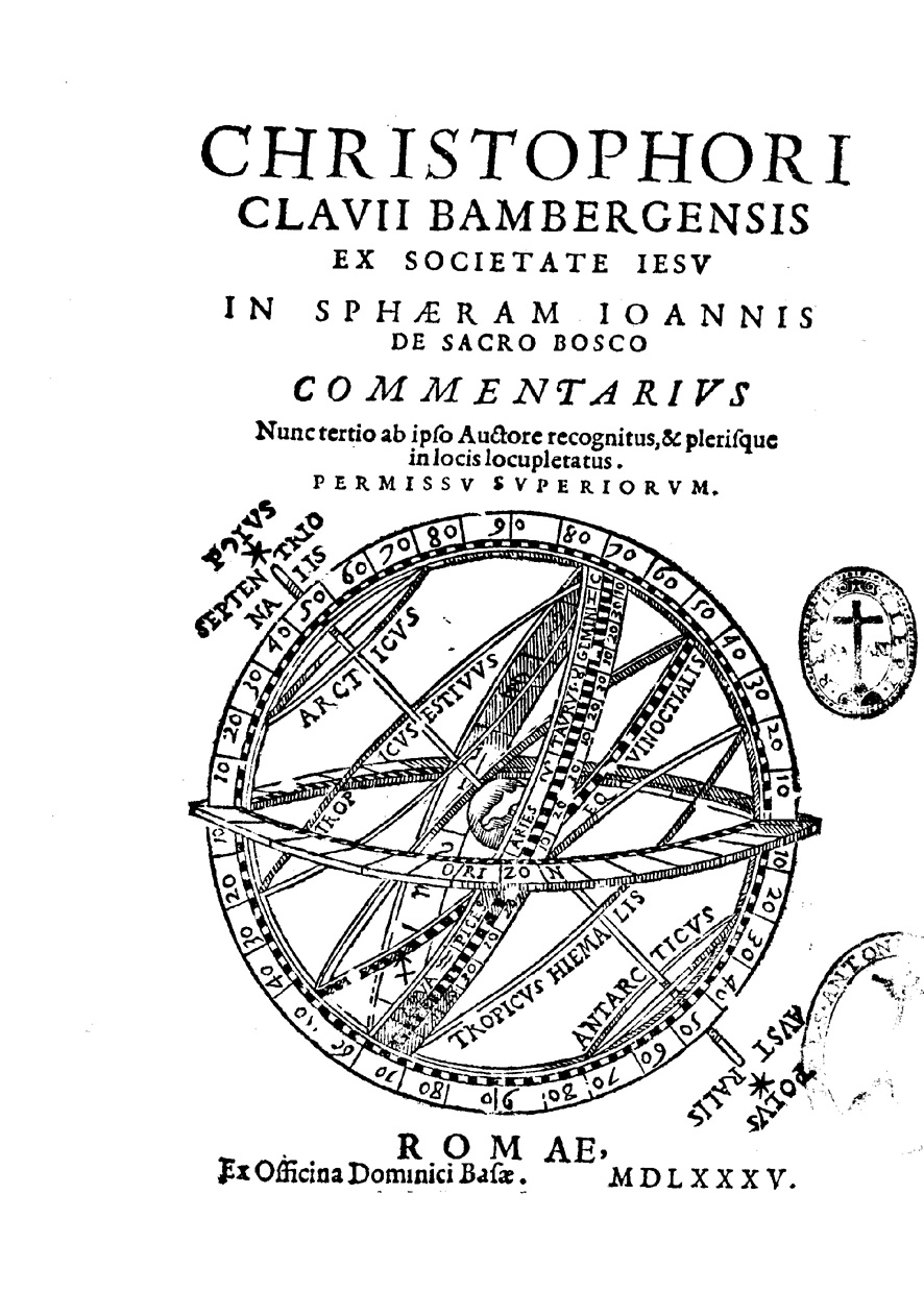 Christophori Clauii Bambergensis ... In Sphaeram Ioannis de Sacro Bosco commentarius nunc tertio ab ipso auctore recognitus, & plerisque in locis locupletatus. - Romae : ex officina Dominici Basae, 1585 (Romae : ex typographia Dominici Basae, 1585). - [32], 483, [1] p. : ill. ; 4º. - Con il testo della Sphaera mundi .